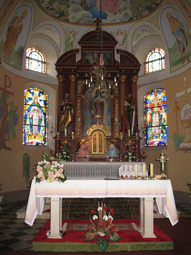 Oltar svete Terezije Avilske u Crkvi svete Terezije Avilske u Ravnoj Gori